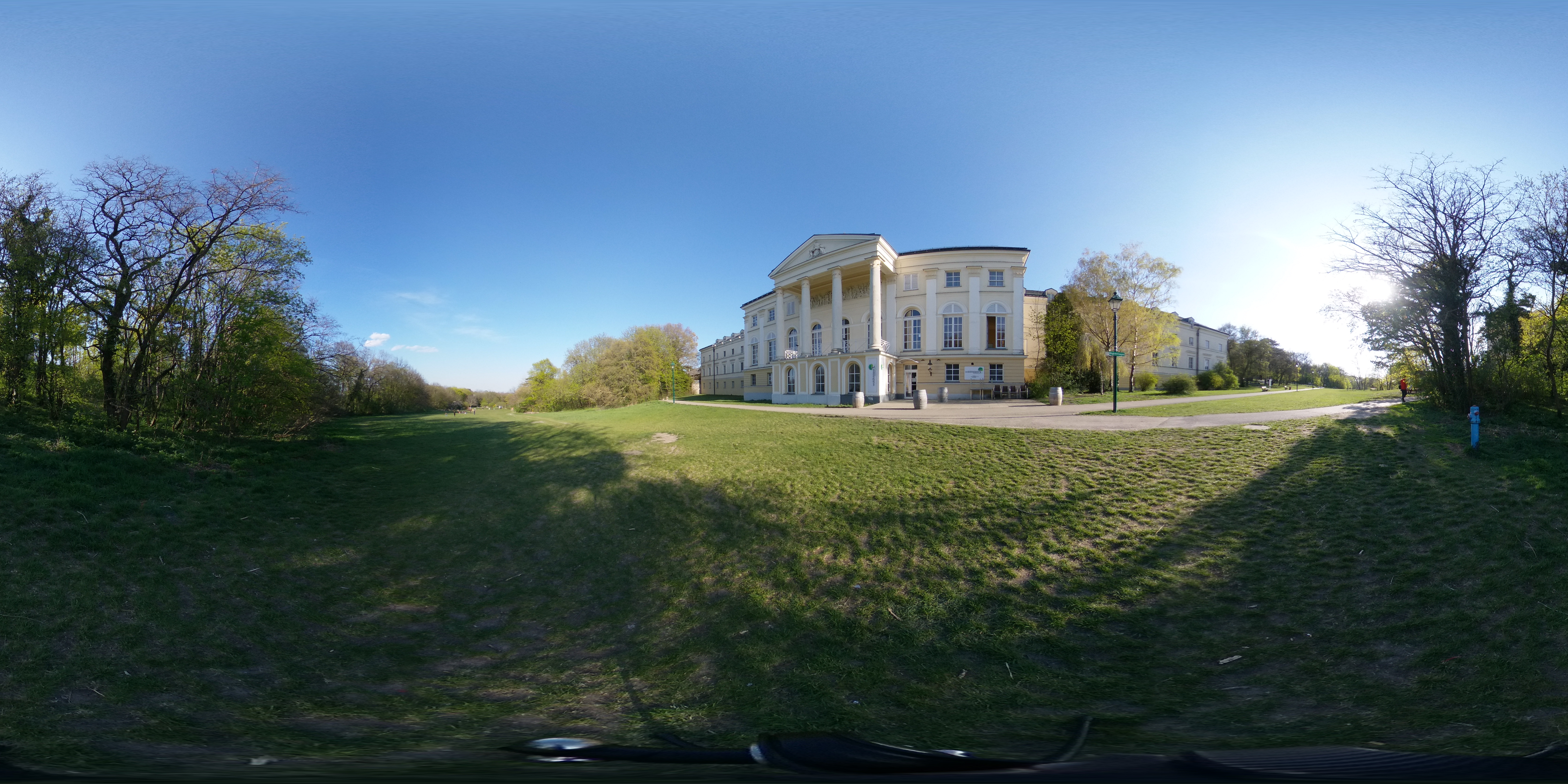 360° Grad Aufnahme von dem Schloss Liechtenstein nebst der Burg Liechtenstein in Maria Enzersdorf im Bezirk Mödling.